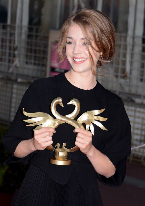 Alice Isaaz au festival du film de Cabourg